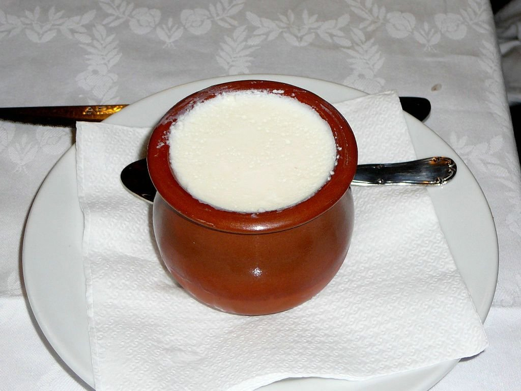 Una cuajada.